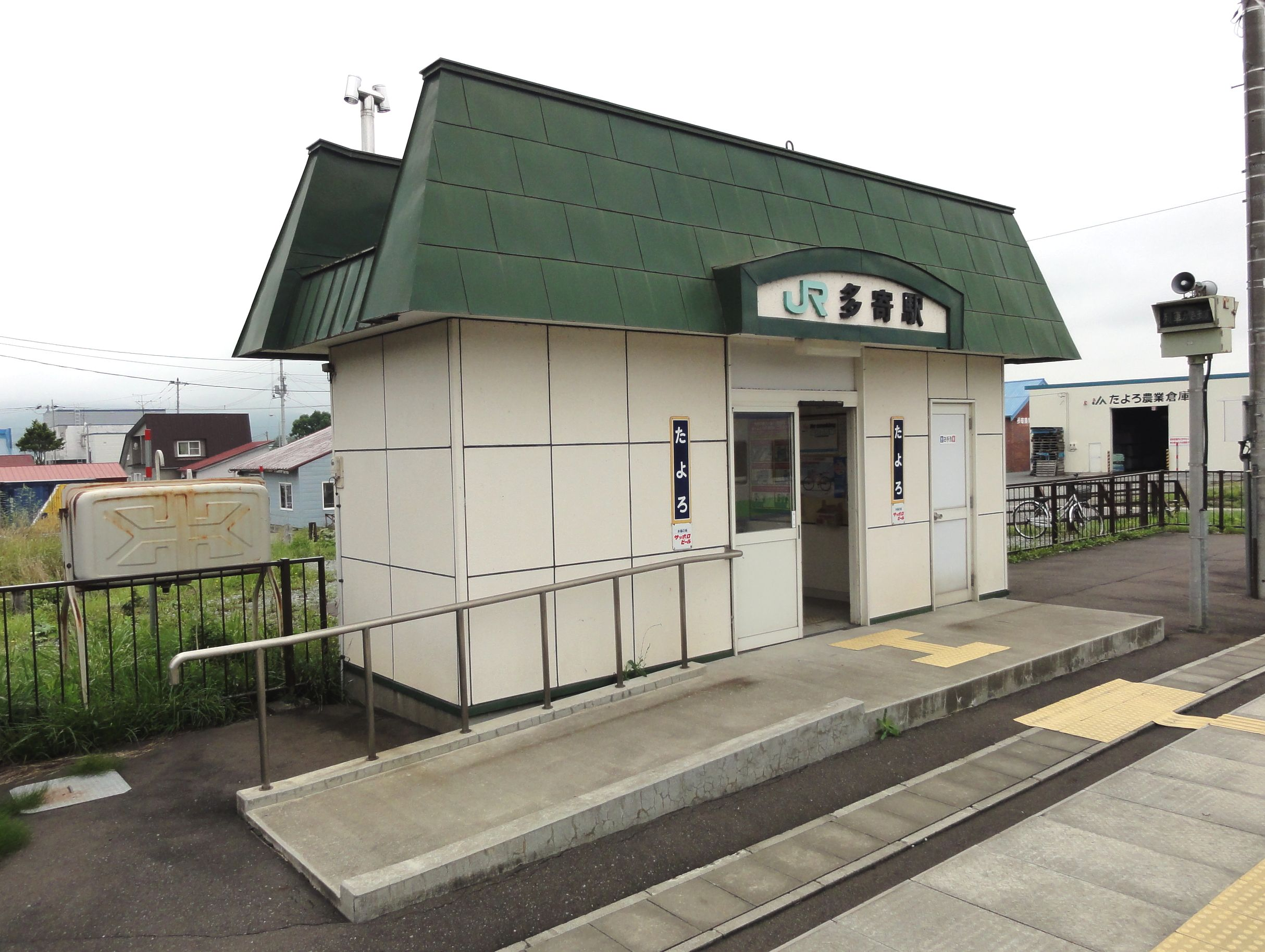 多寄駅待合室